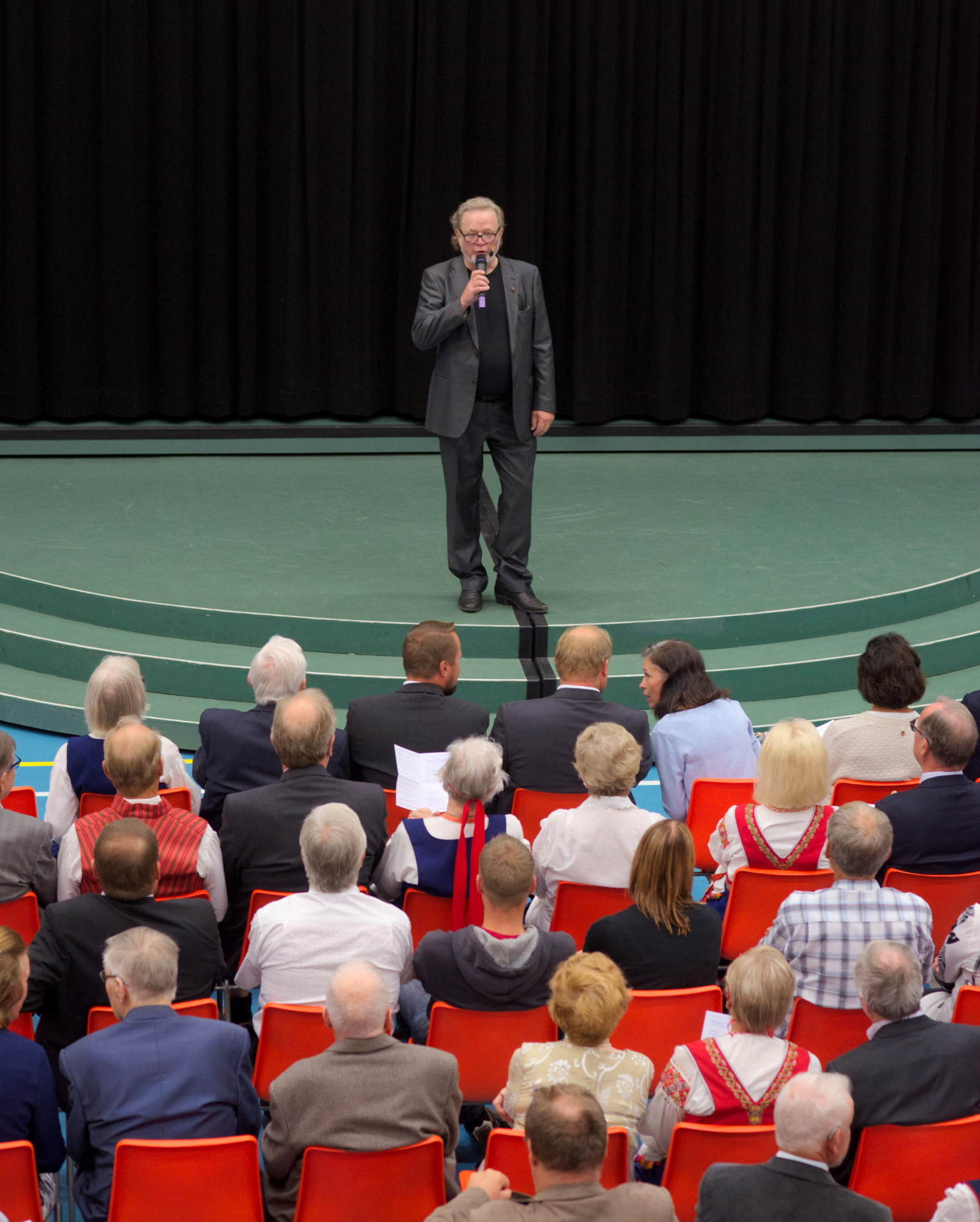 Pekka Saaristo Johannes-juhlilla 5.8.2017 Paimiossa.